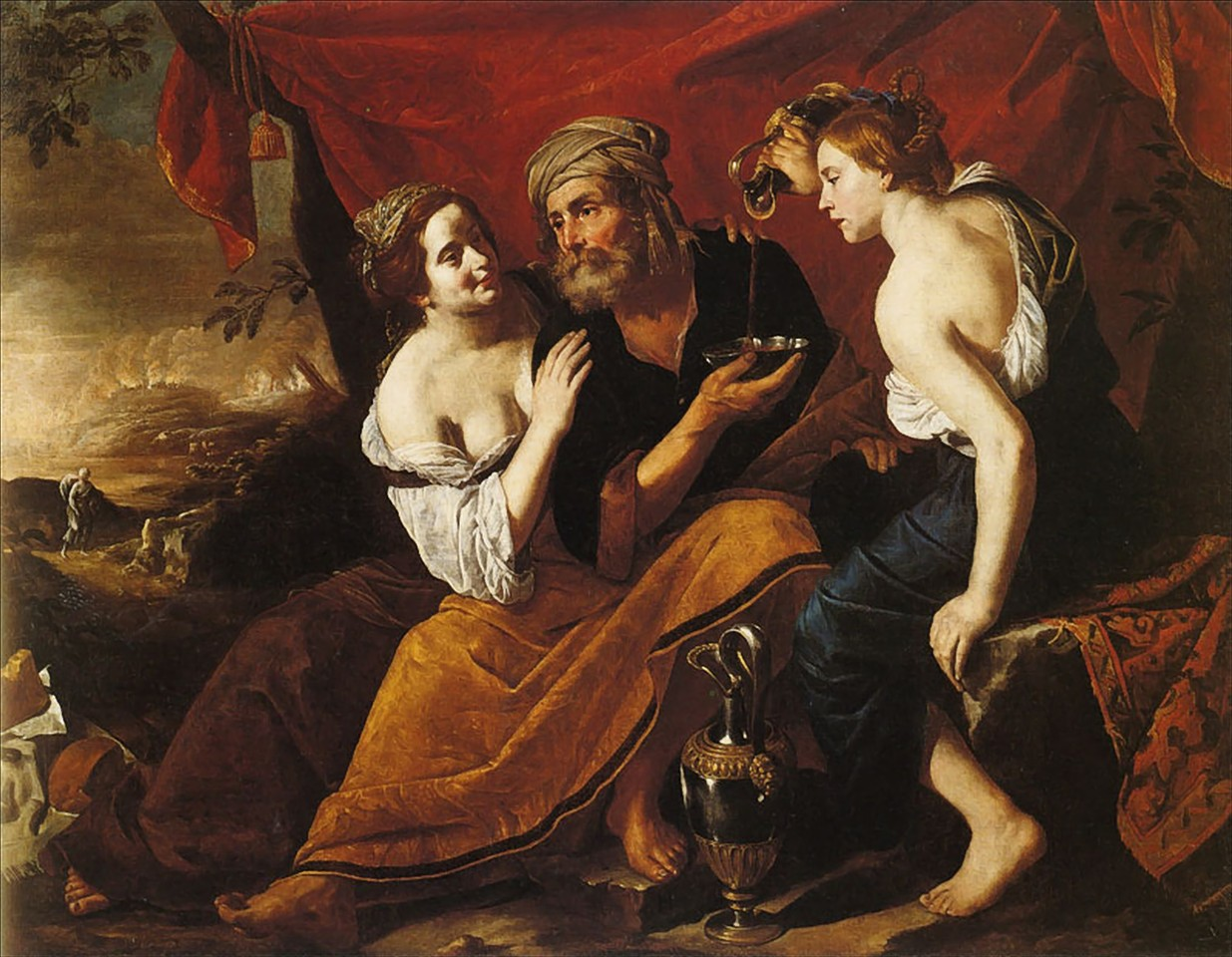 Lot e sue figlie